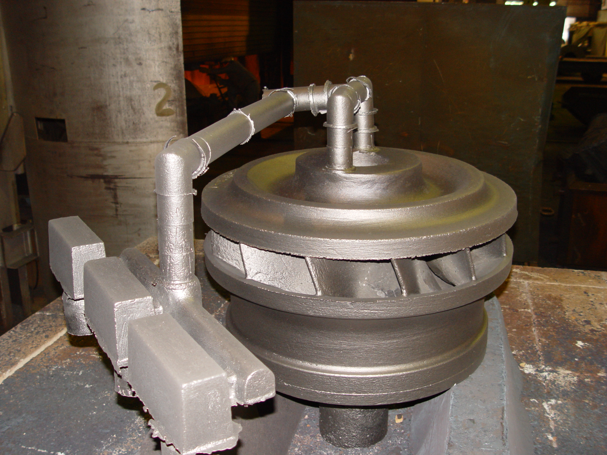 Abguss Laufrad für Wasserturbine